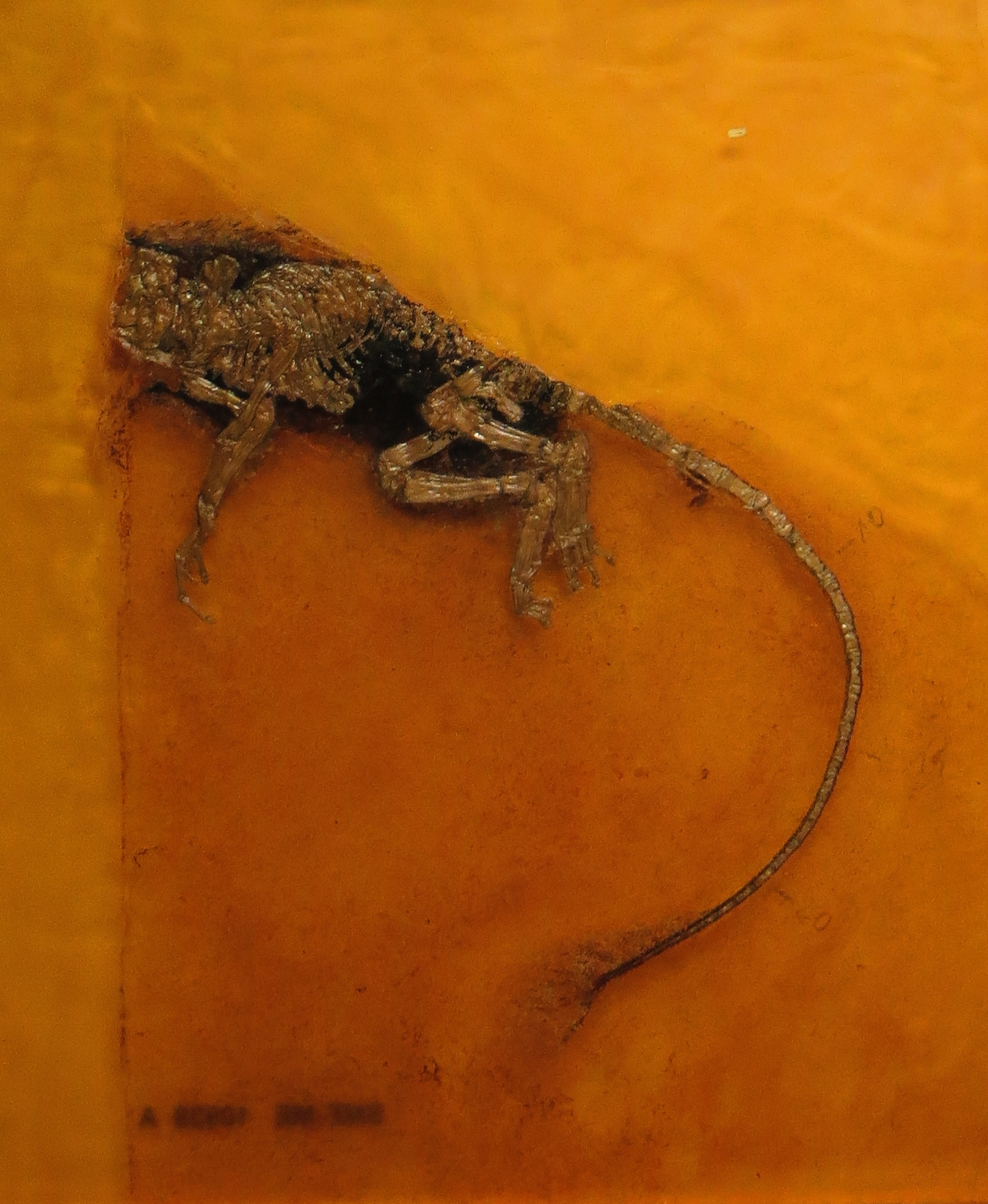 Took the picture at Senckenberg Museum, Frankfurt